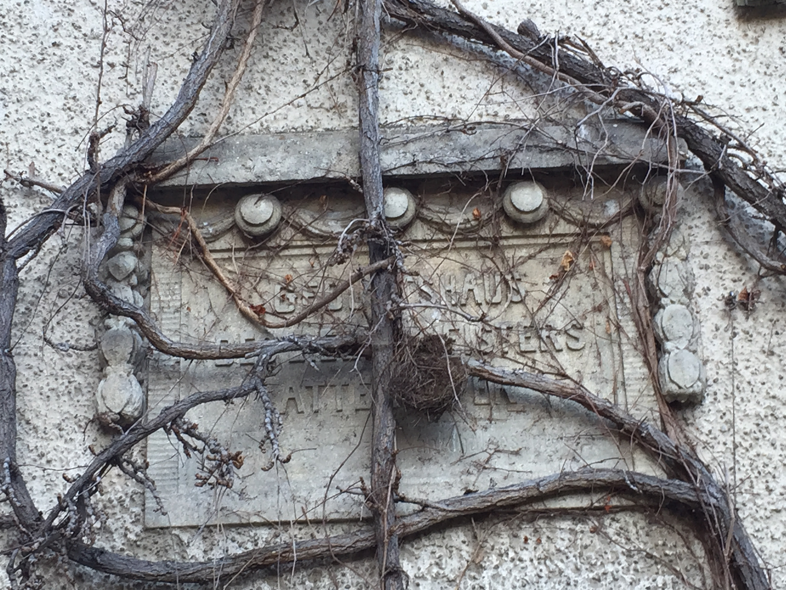 Gedenktafel am Geburtshaus des Musikers Karl Attenhofer in Wettingen